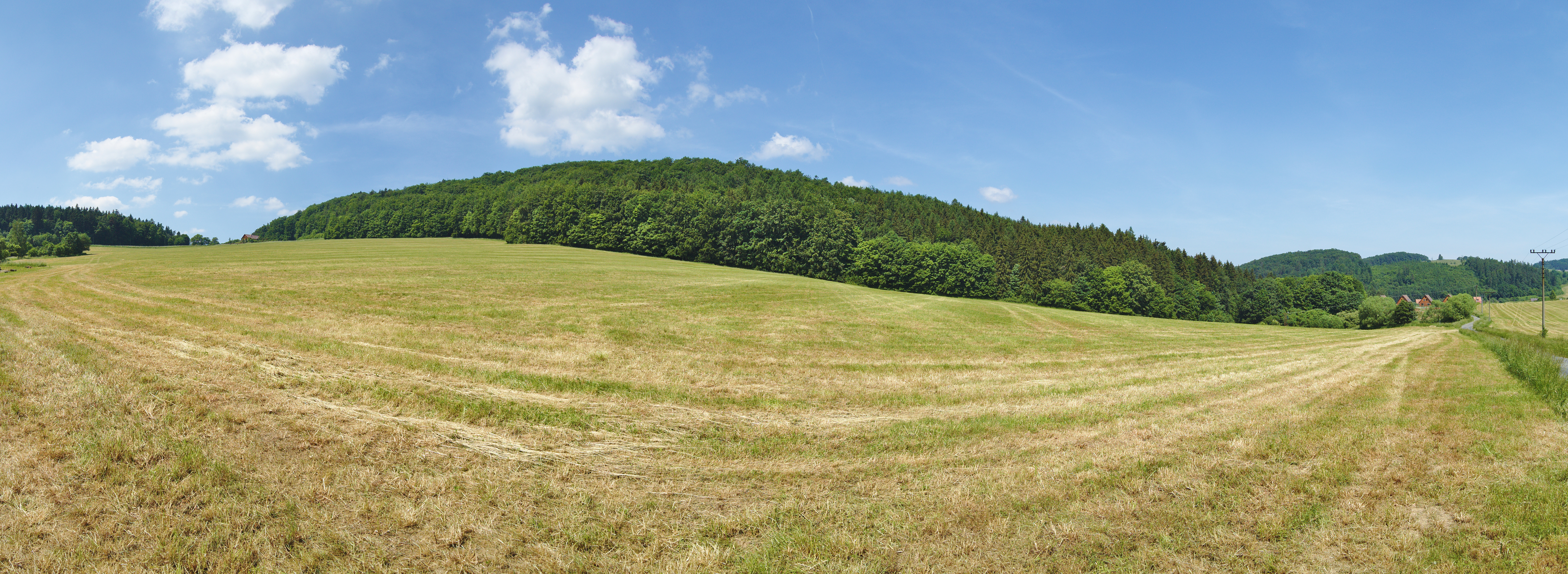 Panoramatický pohled na národní přírodní rezervaci Špraněk, okres Olomouc